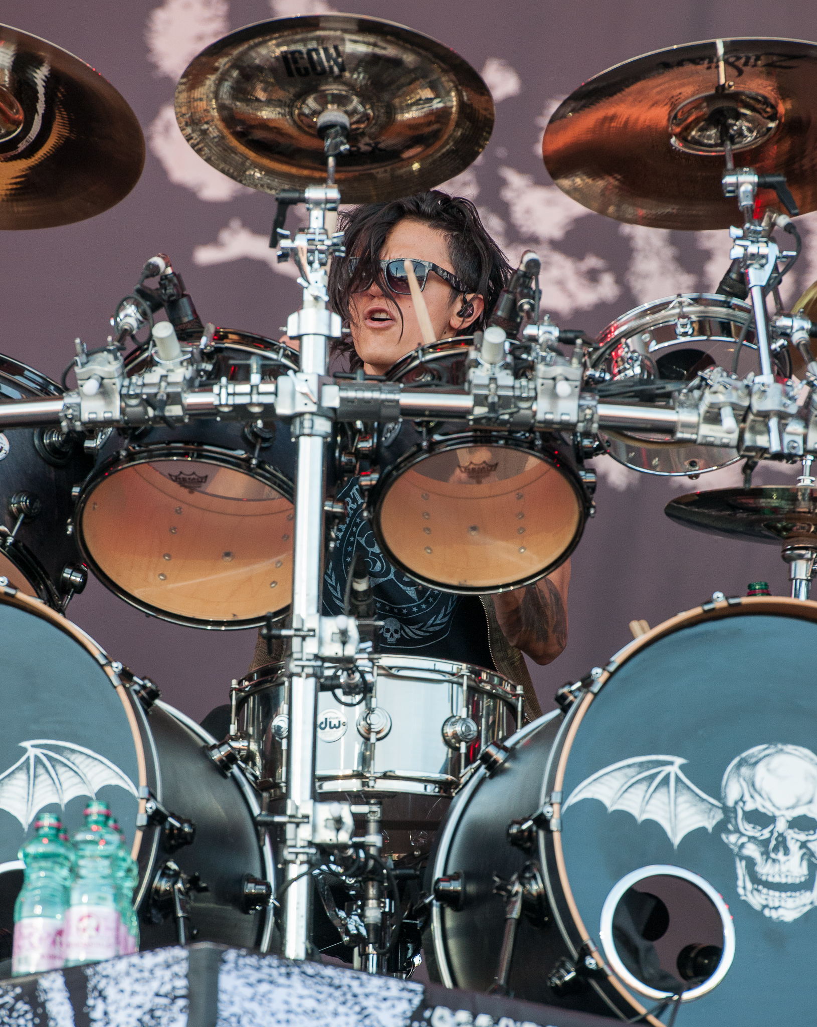 ARGO-Konzerte,Arin Ilejay,Avenged Sevenfold,Konzert,Livekonzert,Livemusik,Musik,RiP,Rock im Park 2014